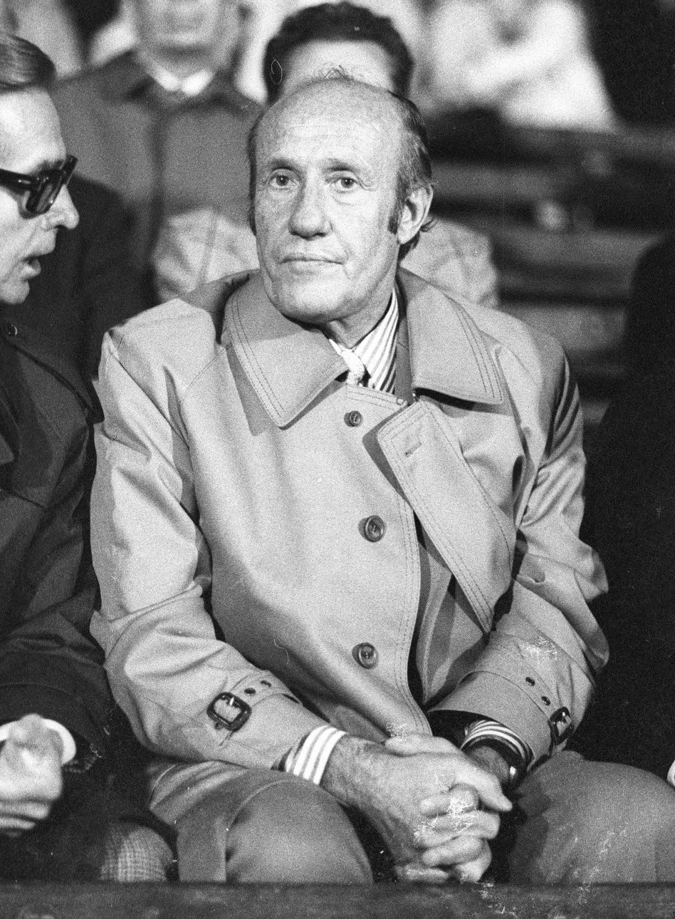 Fußball-Bundestrainer Helmut Schön auf der Tribüne des Holsteinstadions anlässlich des Spiels der Auswahl des Norddeutschen Fußballverbandes (NFV) gegen Jütland, 0: 0.